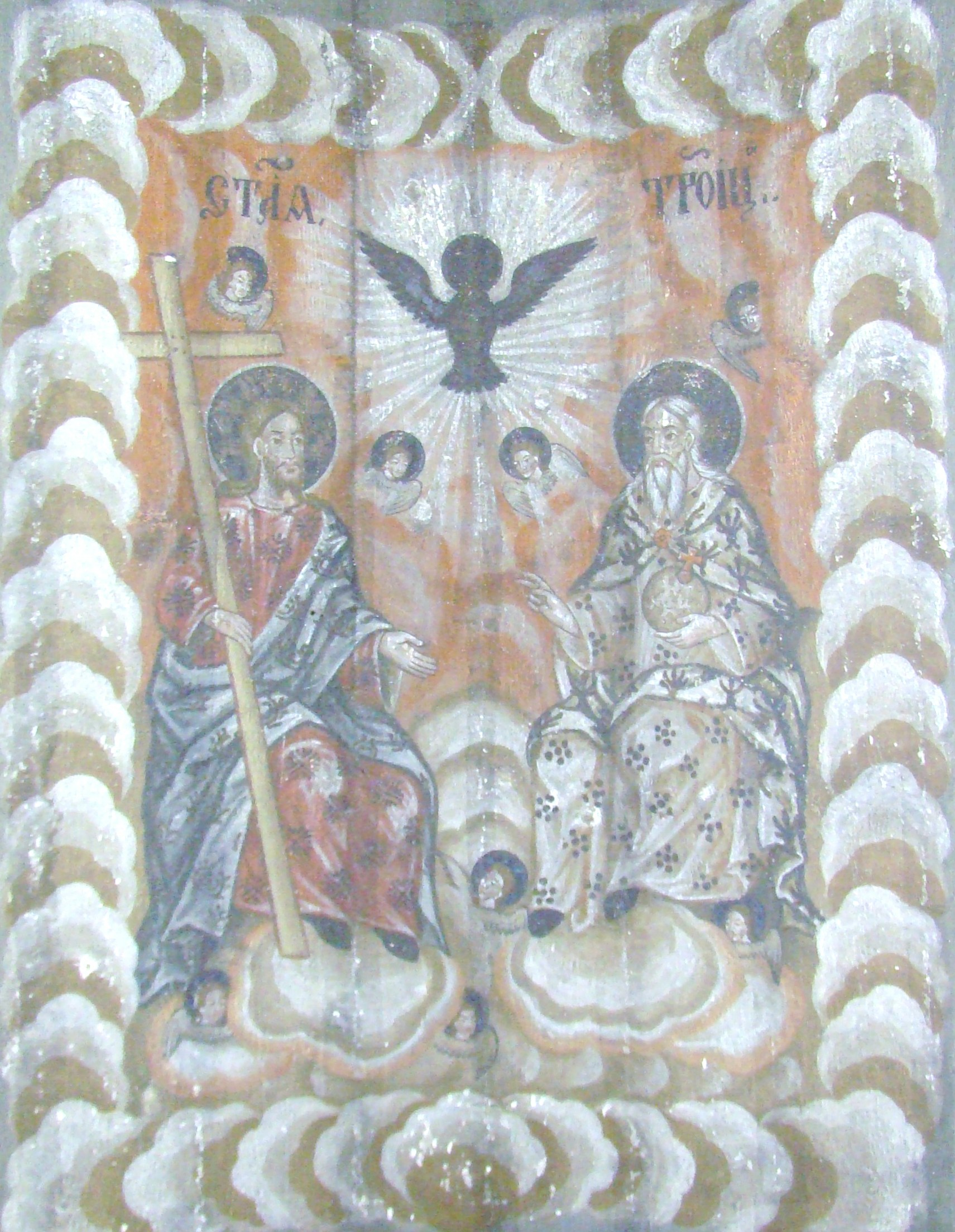 Biserica de lemn „Sfântul Ioan Evanghelistul” din Apoldu de Jos, comuna Apoldu de Jos, judeţul Sibiu